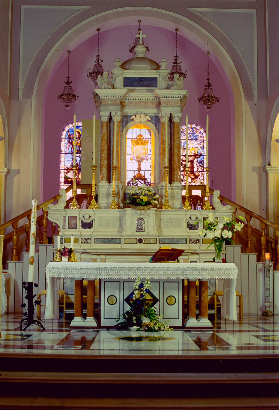 Altare Volto Santo di Manoppello